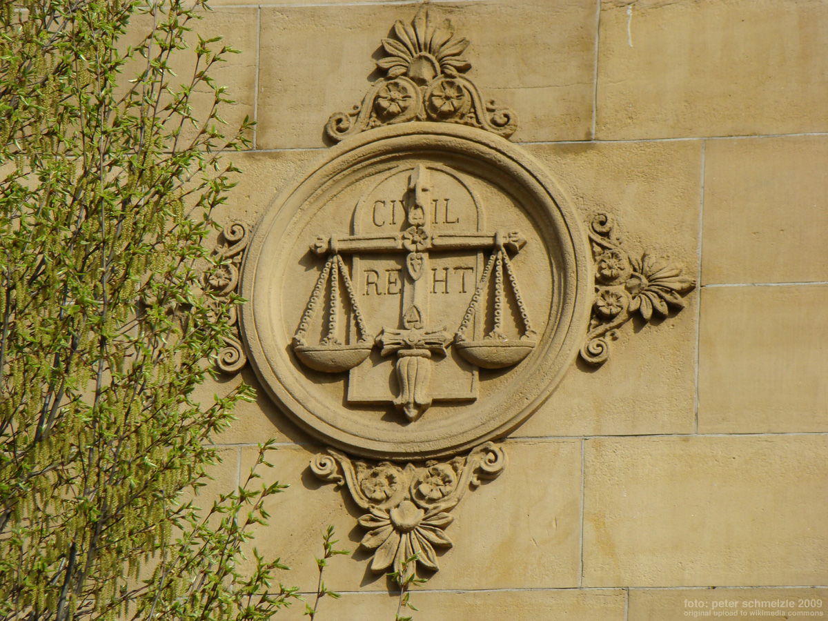 Fassadenschmuck der Villa Kübel, Wilhelmstraße 11 in Heilbronn